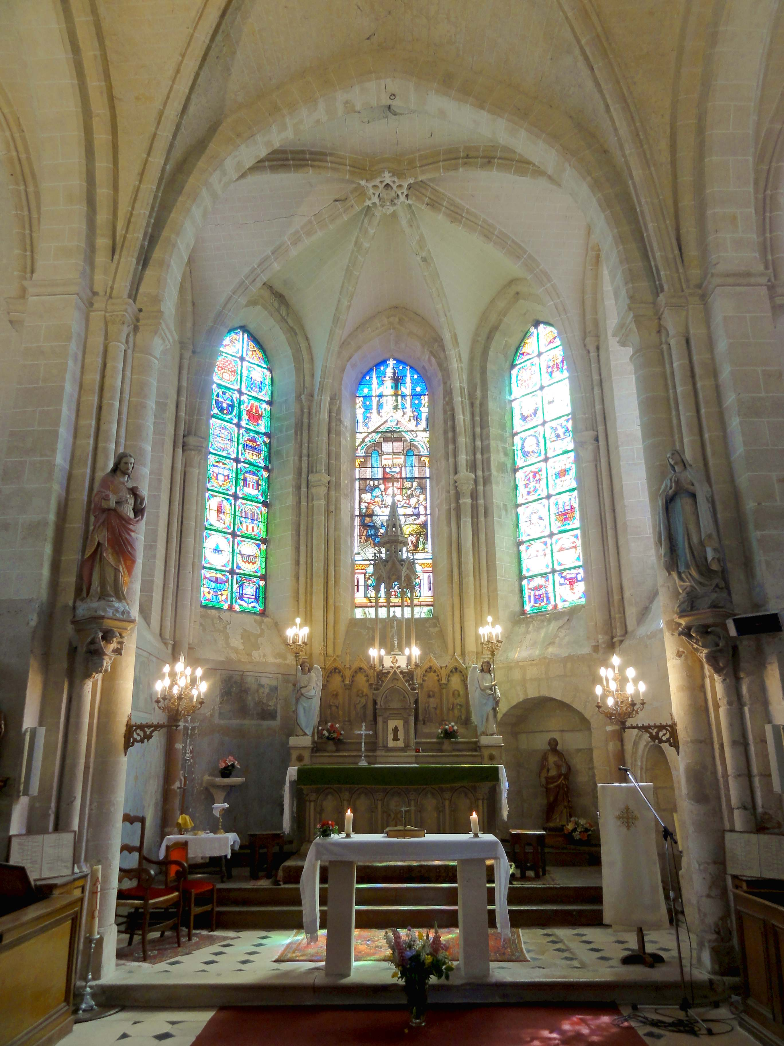 Intérieur de l'église Saint-Nicolas de Jonquières (voir titre).